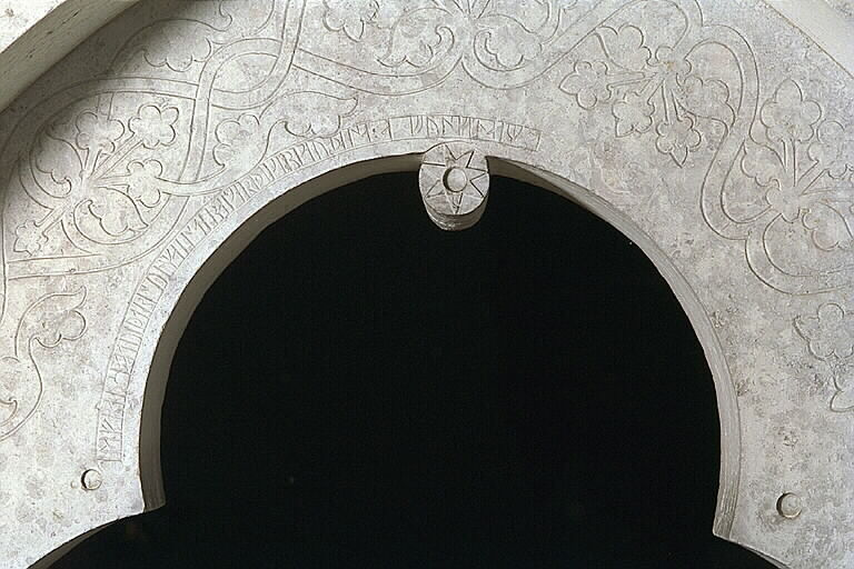 Runristning på korportalen. Inskriften lyder i sin helhet: Lafrans, son till mästare Botvid av Eskelhem, gjorde denna kyrka.